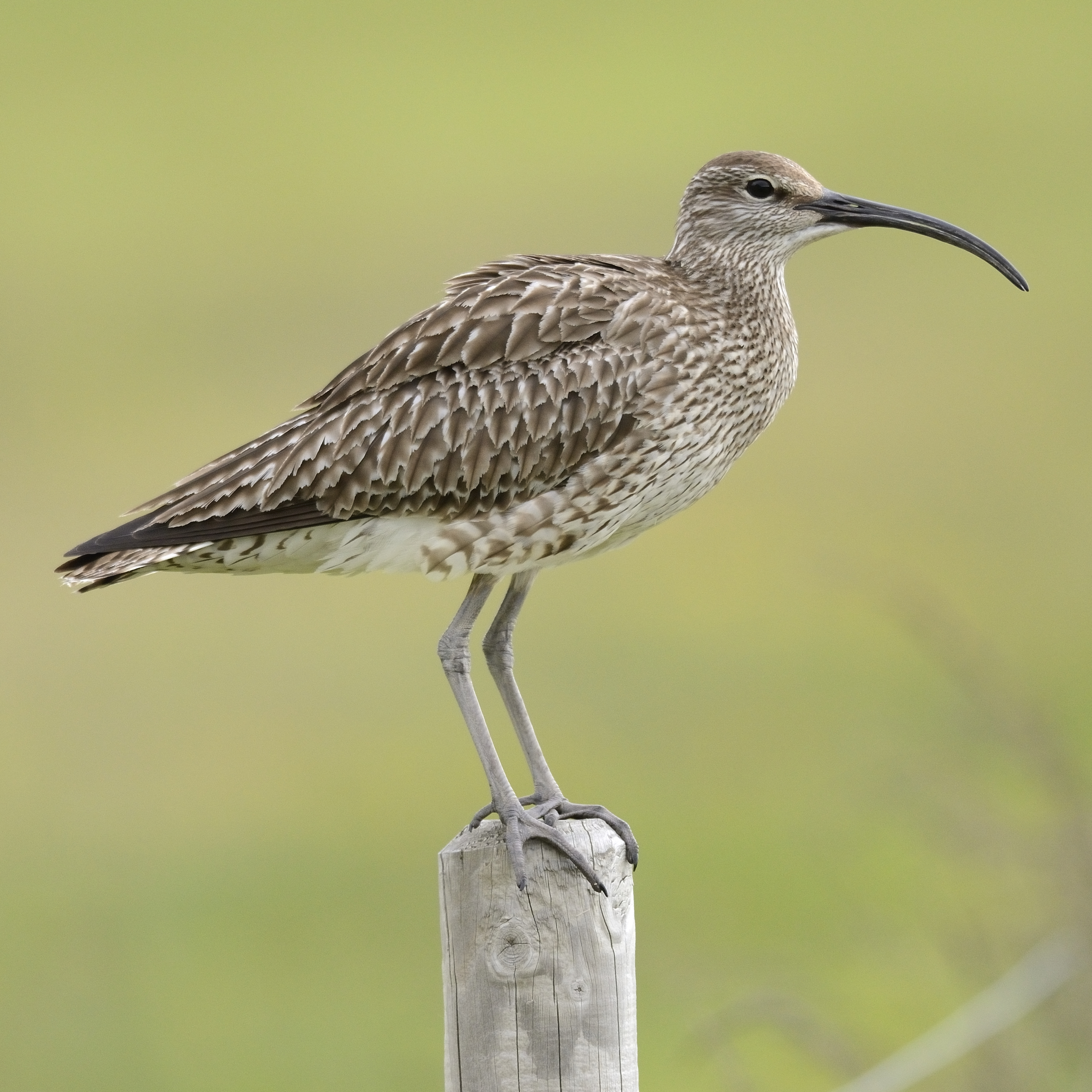 Whimbrel